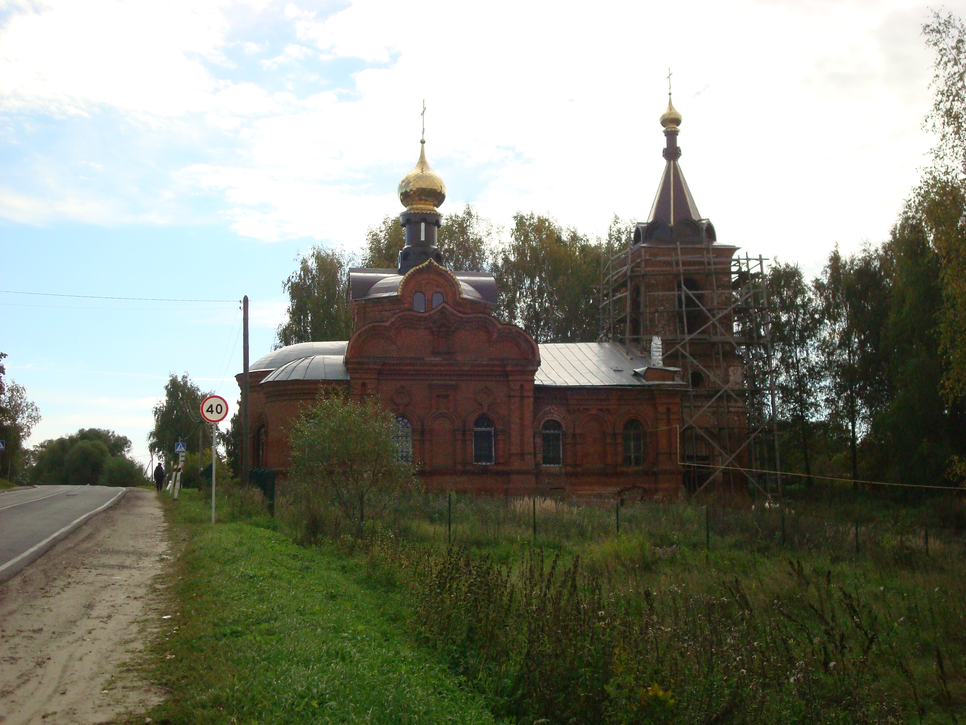 Церковь Александра Невского: Новоалександрово, Суздальский район, Владимирская область